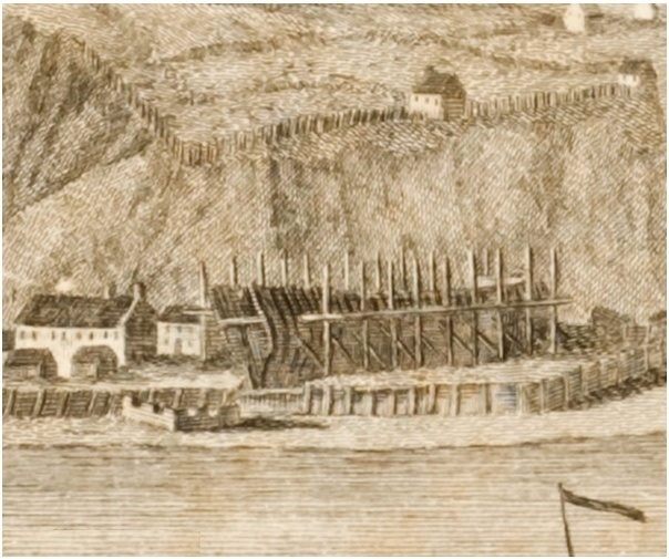 Un vaisseau en construction à Québec au milieu du XVIIIème siècle. Anse du Cul-de-Sac vue depuis la Pointe de Lévy. Détail d'une gravure d'époque.